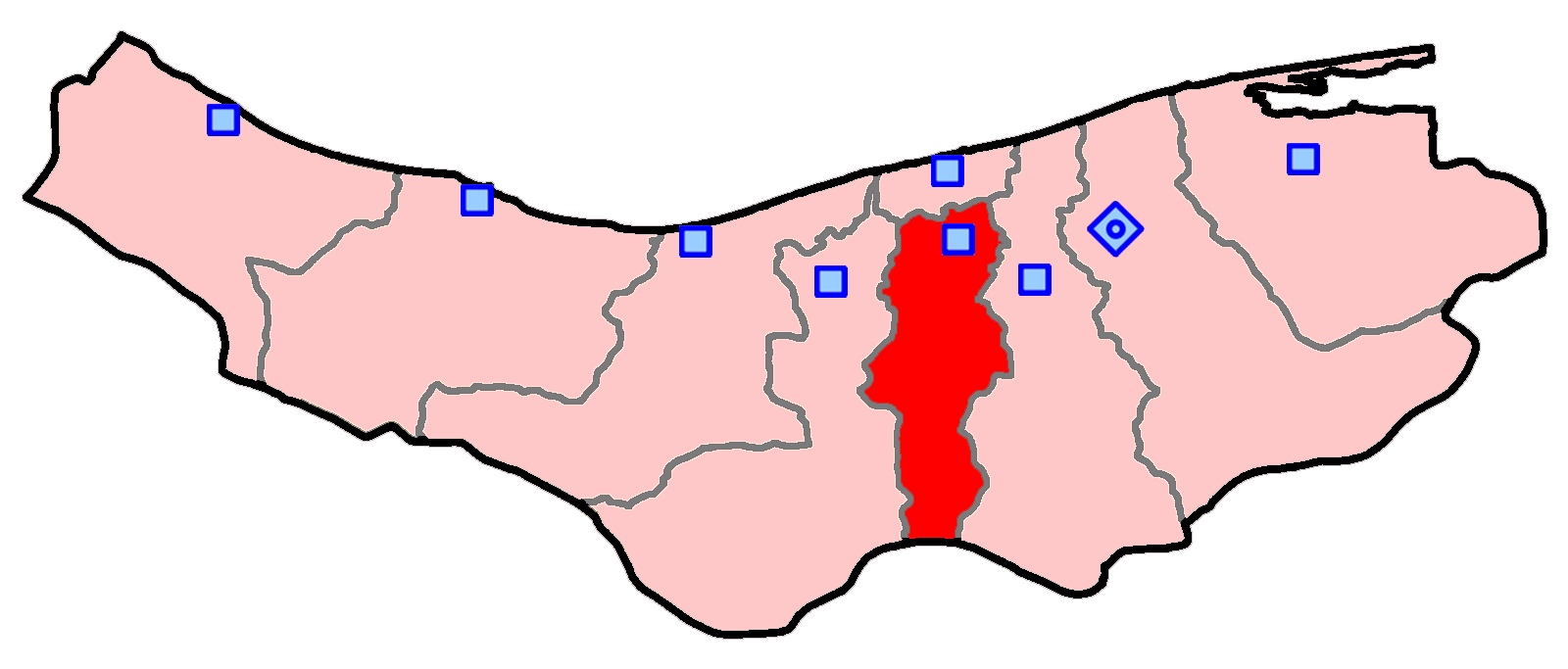 حوزهٔ انتخاباتی بابل برای انتخابات مجلس شورای اسلامی